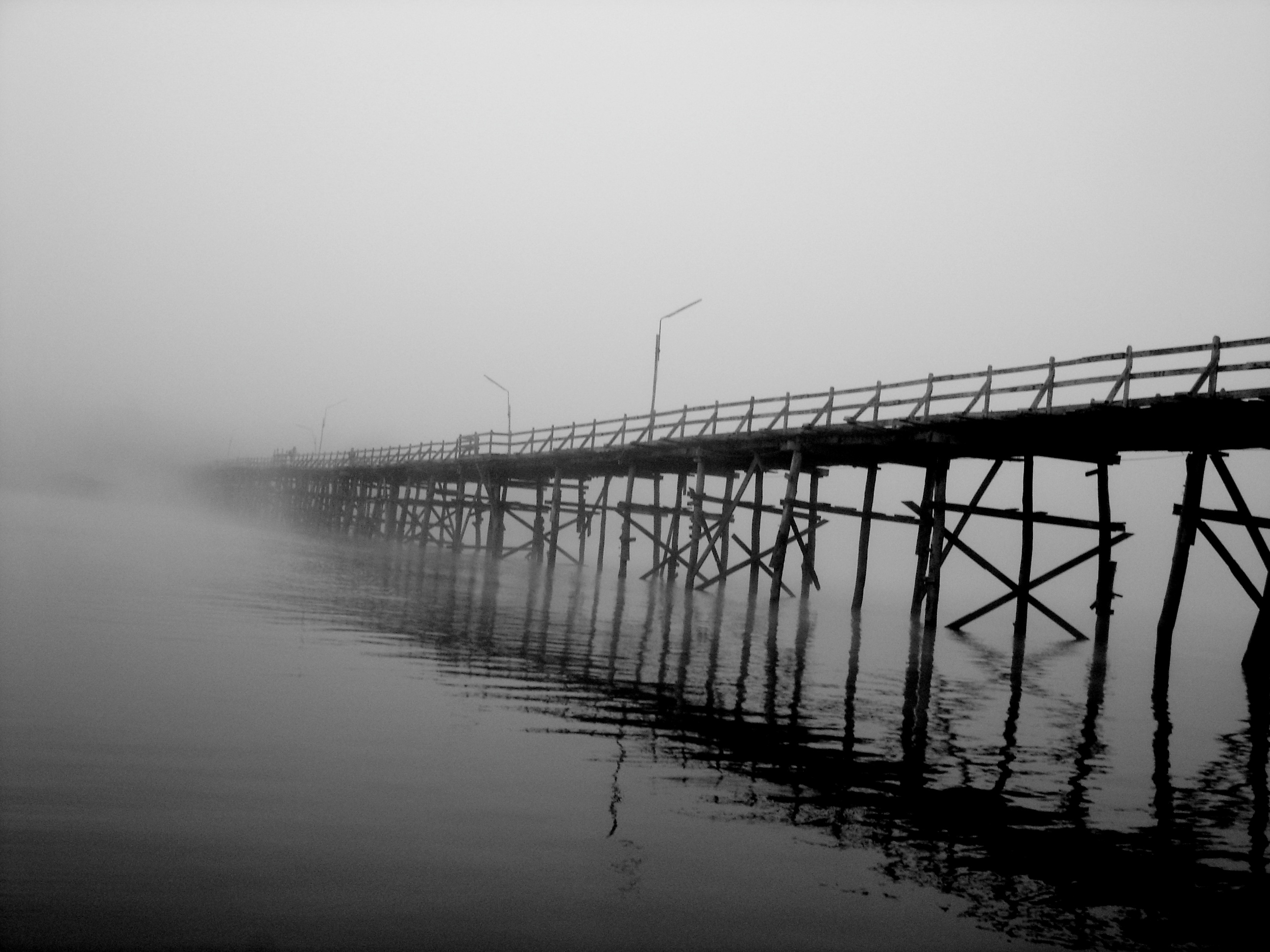 Bridge III, Sangkhlaburi, Thailand